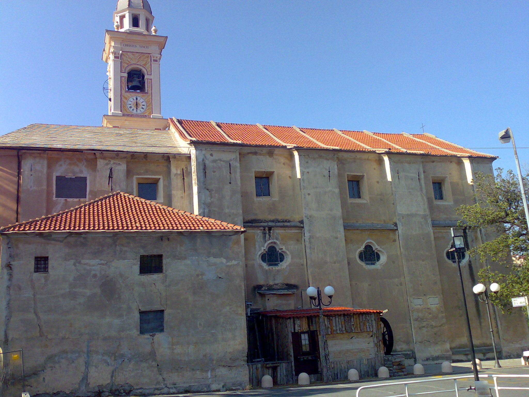 Chiesa parrocchiale di San Maurizio della frazione di Segno del comune di Savona